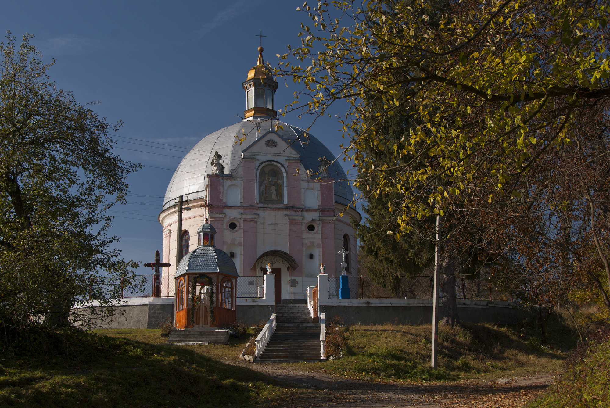 Церква Введення в храм Пресвятої Богородиці (1800 р.) в селі Вибранівка